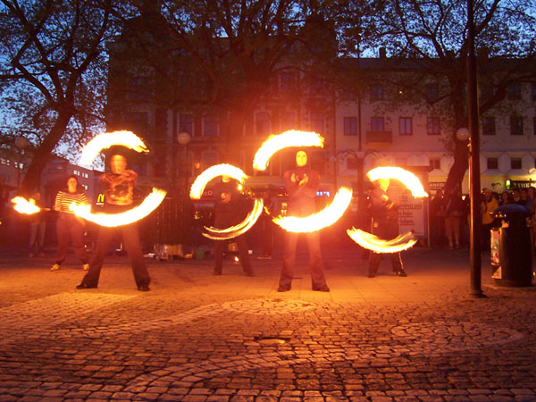 Drill med eld på RUM-festivalen 2005. Foto: Viktor Åberg Publicerad med tillstånd från upphovsrättsinnehavaren.